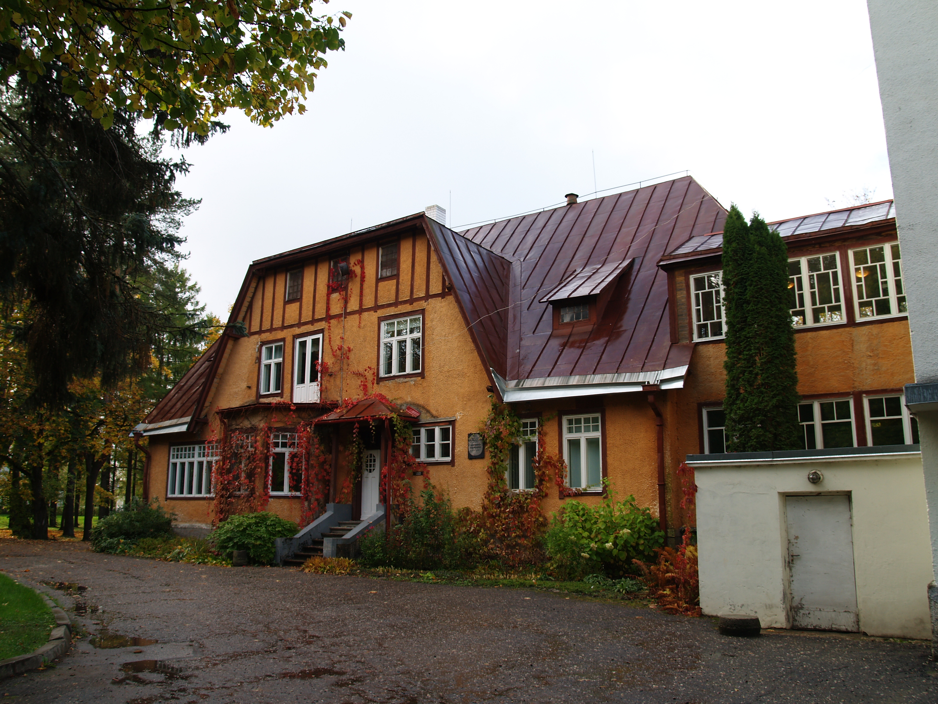 Maja (Riia tn 167), kus elas põllumajandusteadlane Aleksander Eisenschmidt.